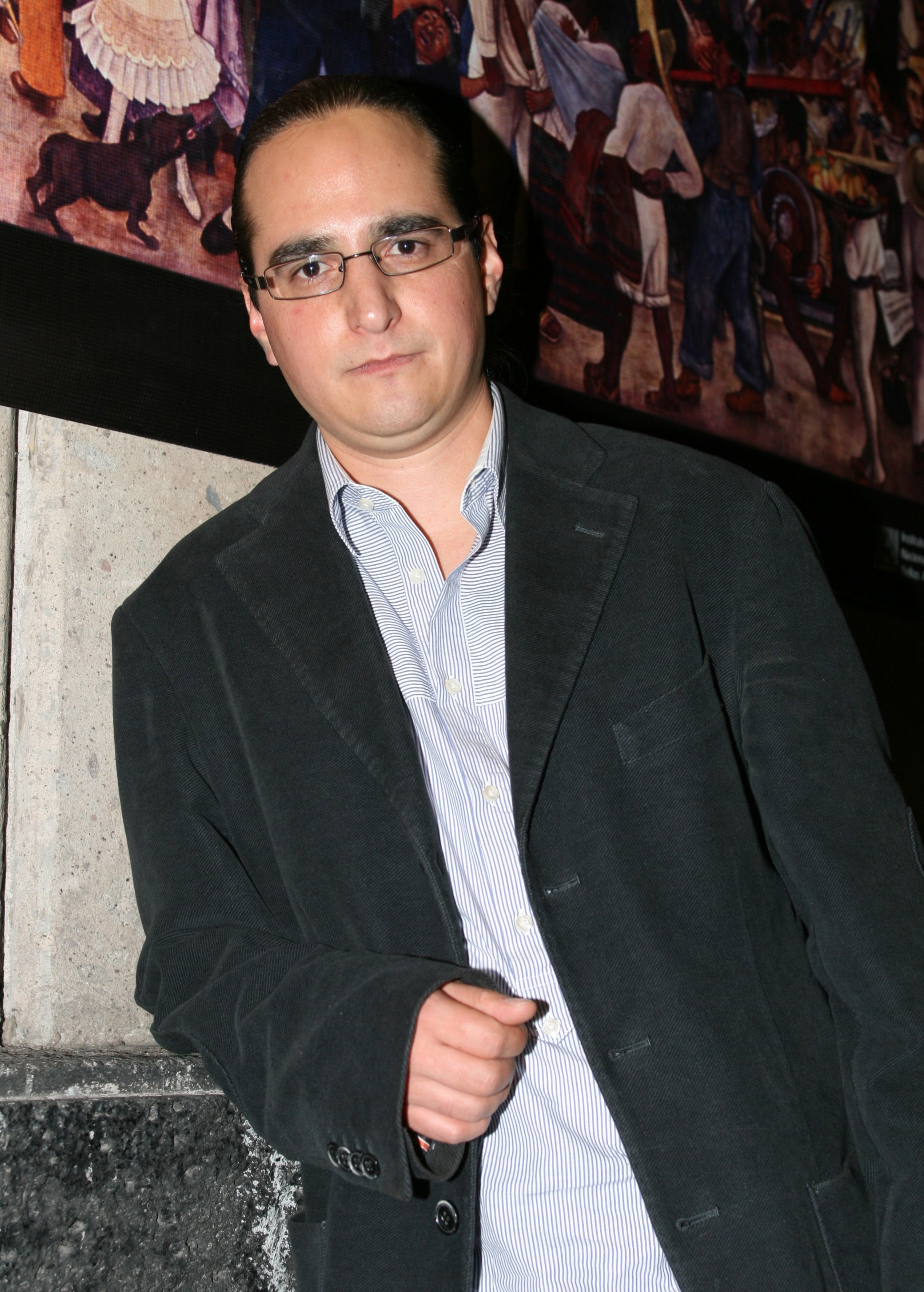 Novelista mexicano